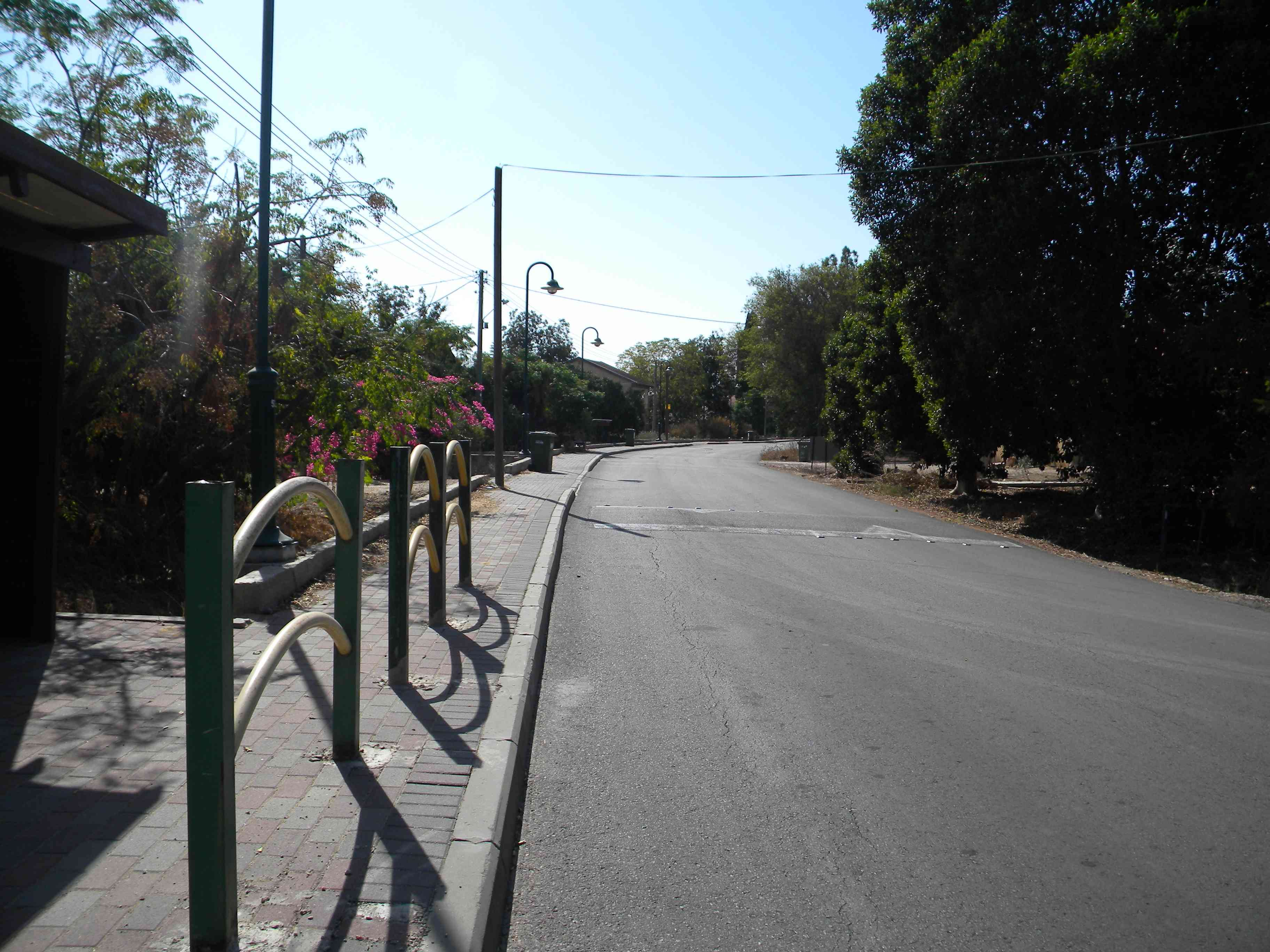 רחוב במישר